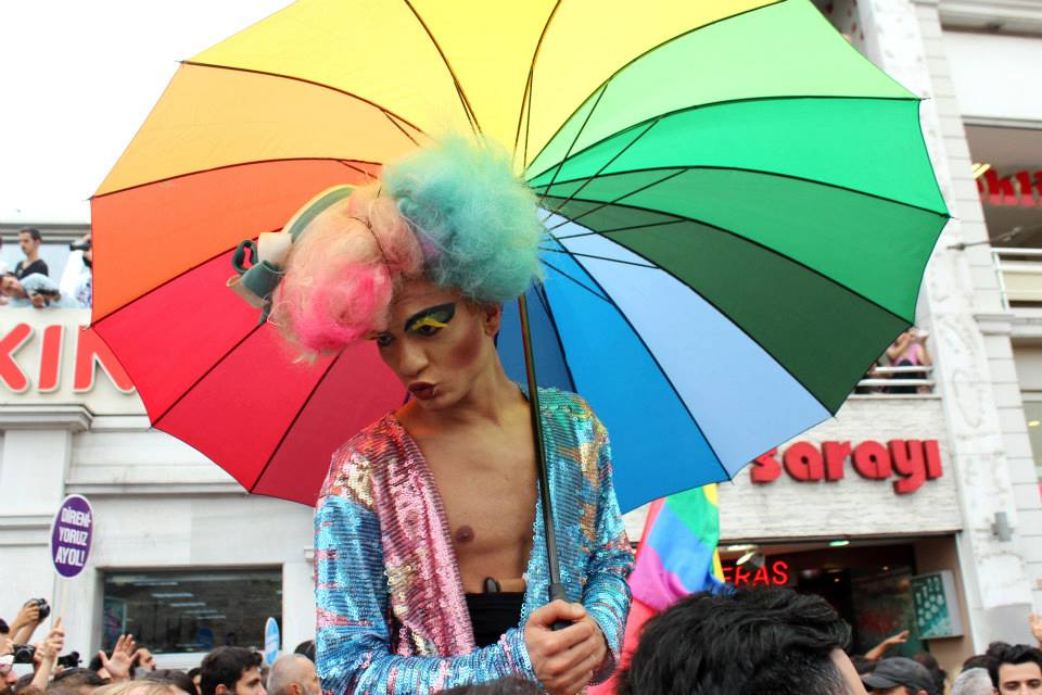 LGBT Onur Haftası, 21. LGBT Onur Yürüyüşü, 2013, Taksim, İstanbul.